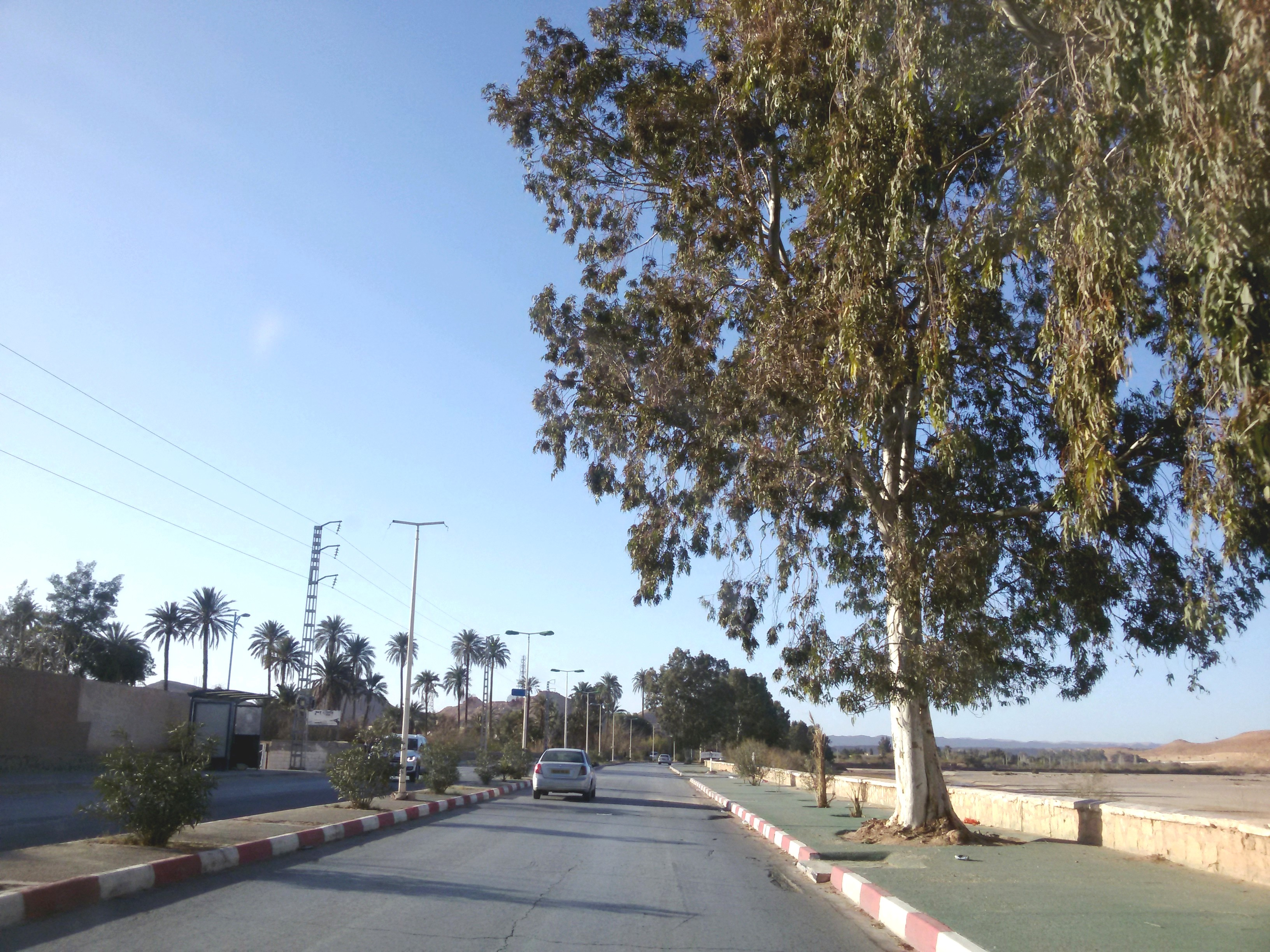 coté EST de Laghouat ville.